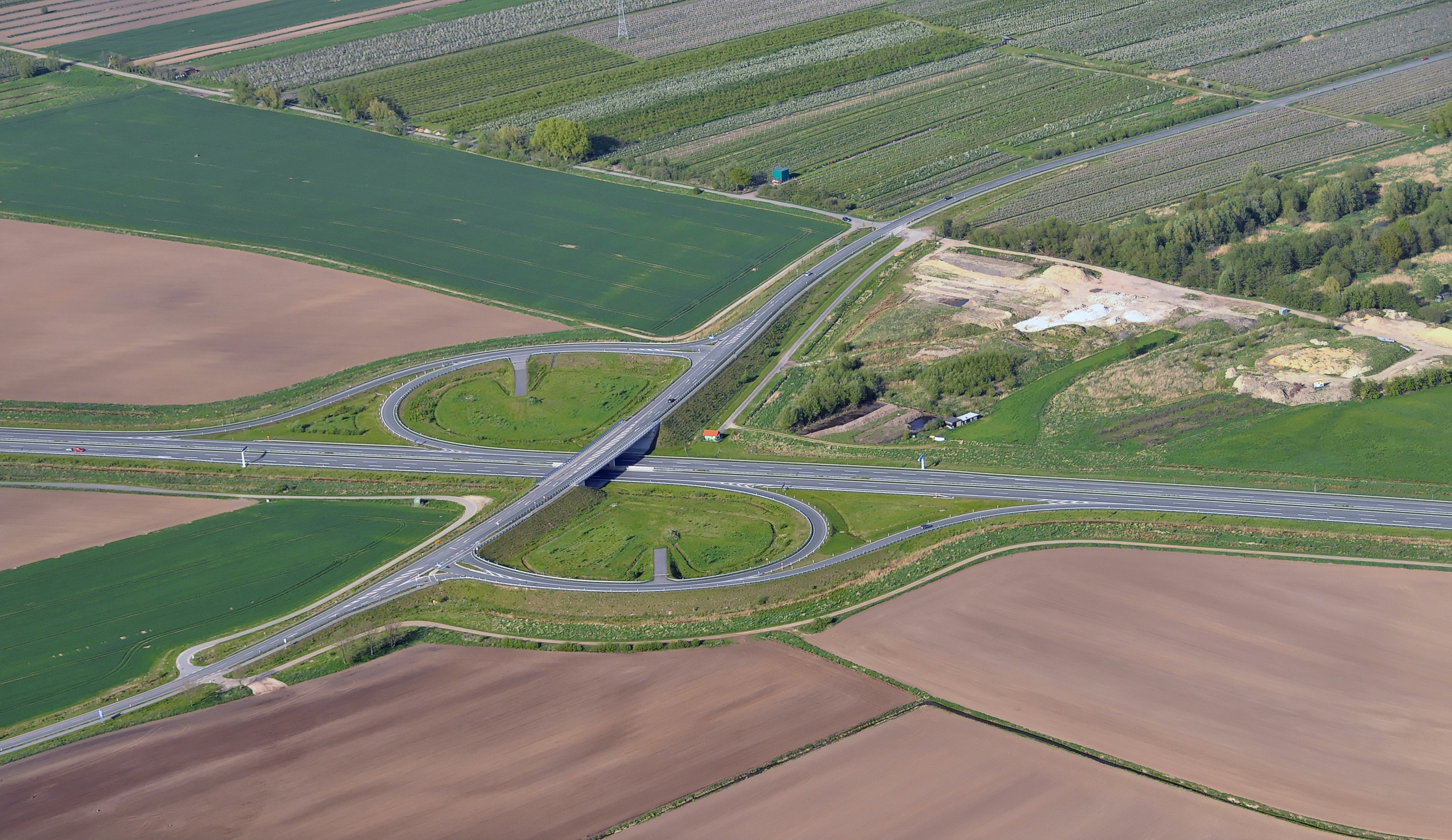 Luftbilder von der Nordseeküste 2012-05: A26-Anschlussstelle Dollern in Agathenburg und Dollern